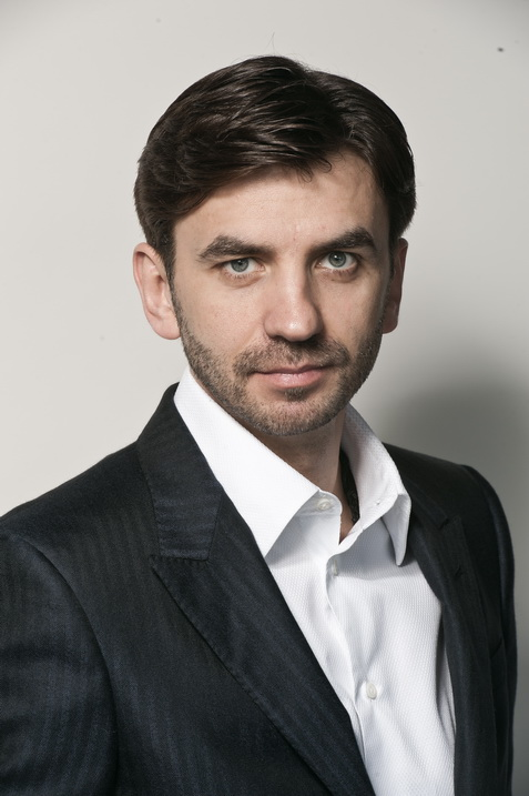 Министр РФ М.А. Абызов